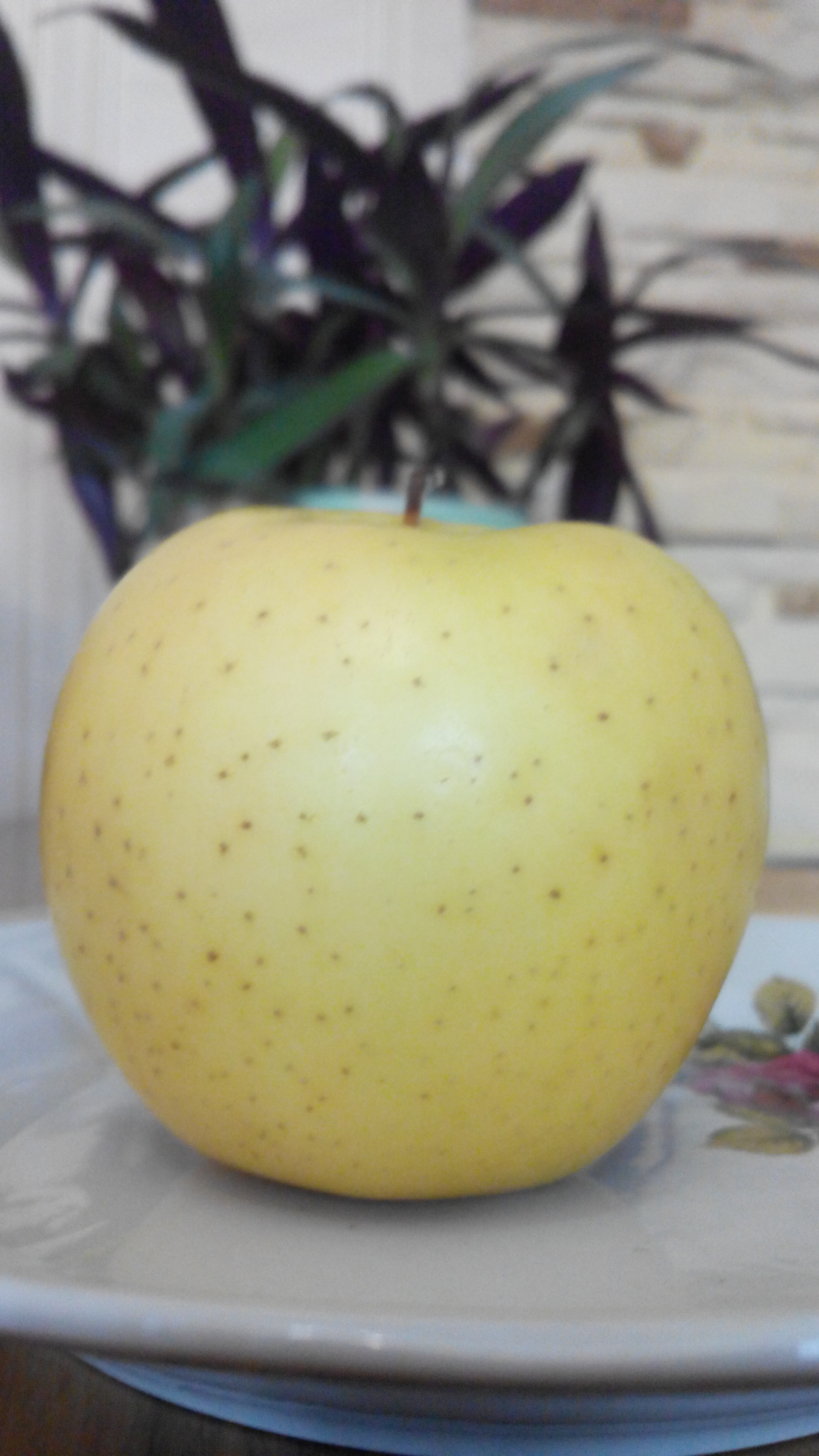 Яблоко сорта "Голден"